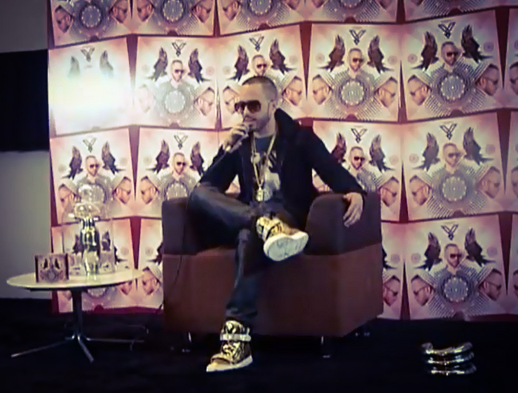 Conferencia Mexico "De lider a leyenda"